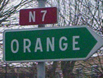 Panneau d'indication de la Nationale 7 vers Orange (Vaucluse)